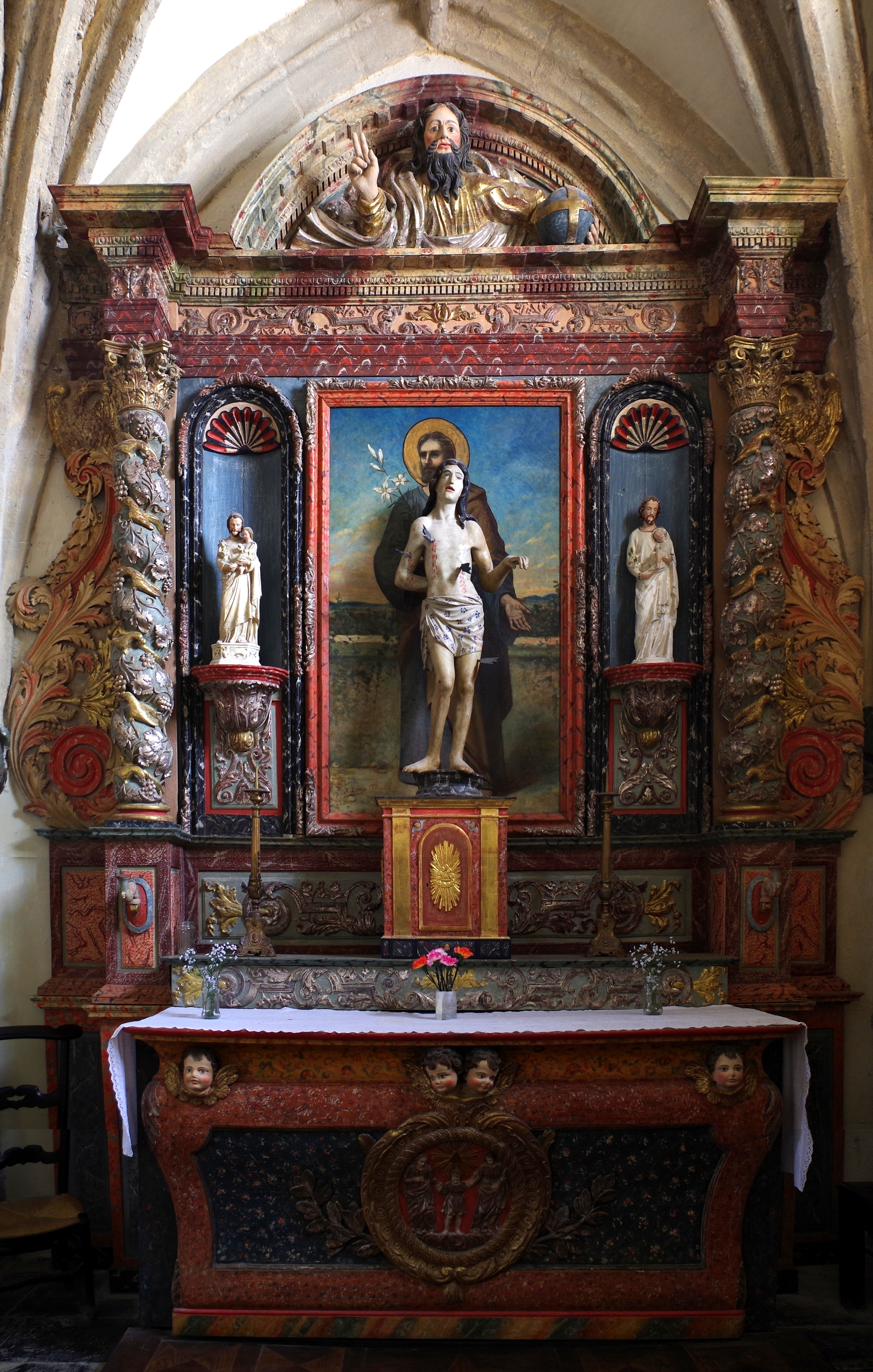 Retable de la chapelle sud (4ème quart du XVIIe) et statue de Saint-Sébastien